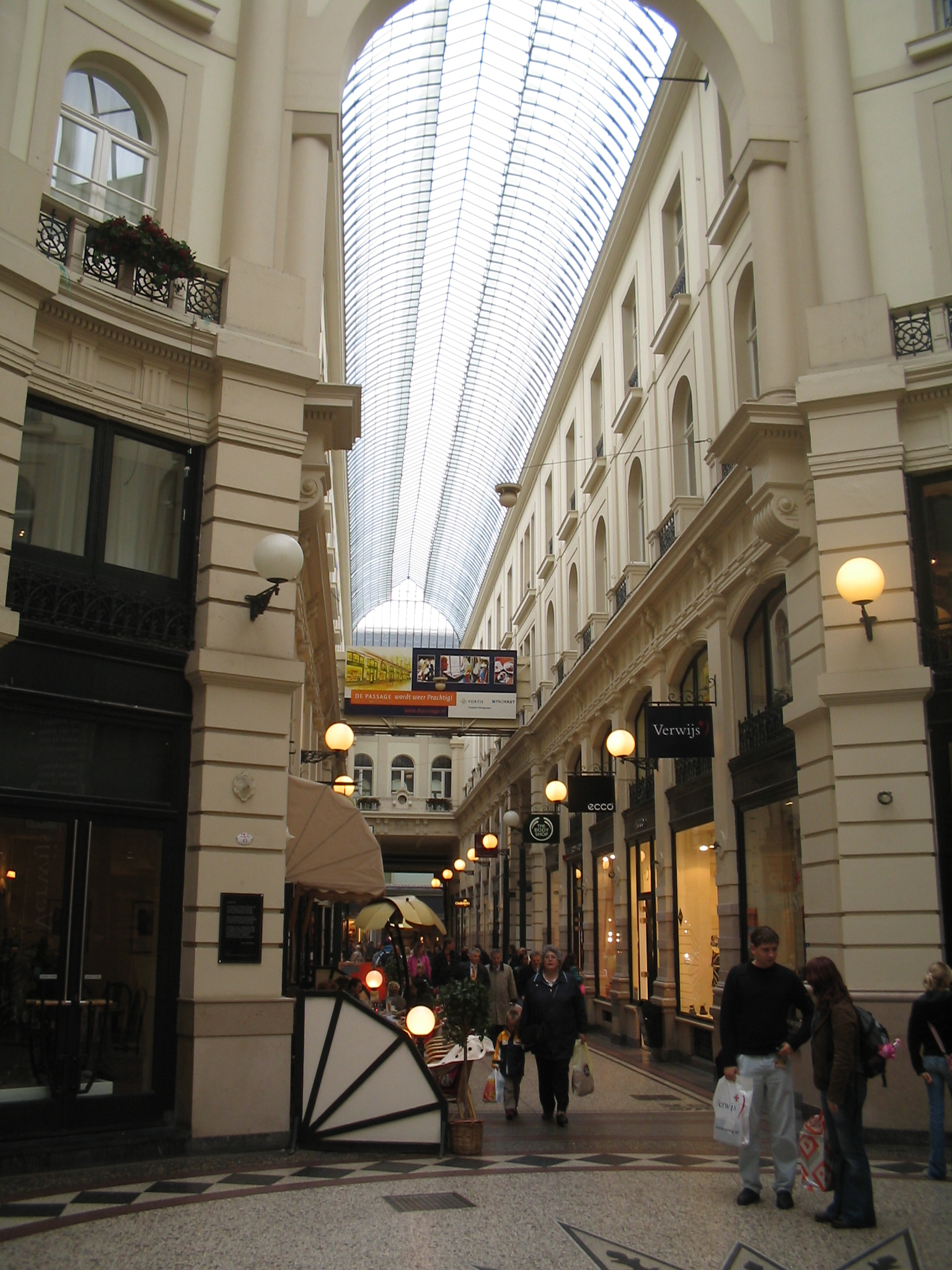 Haagse Passage, Den Haag, Netherlands, 21 oktober 2005